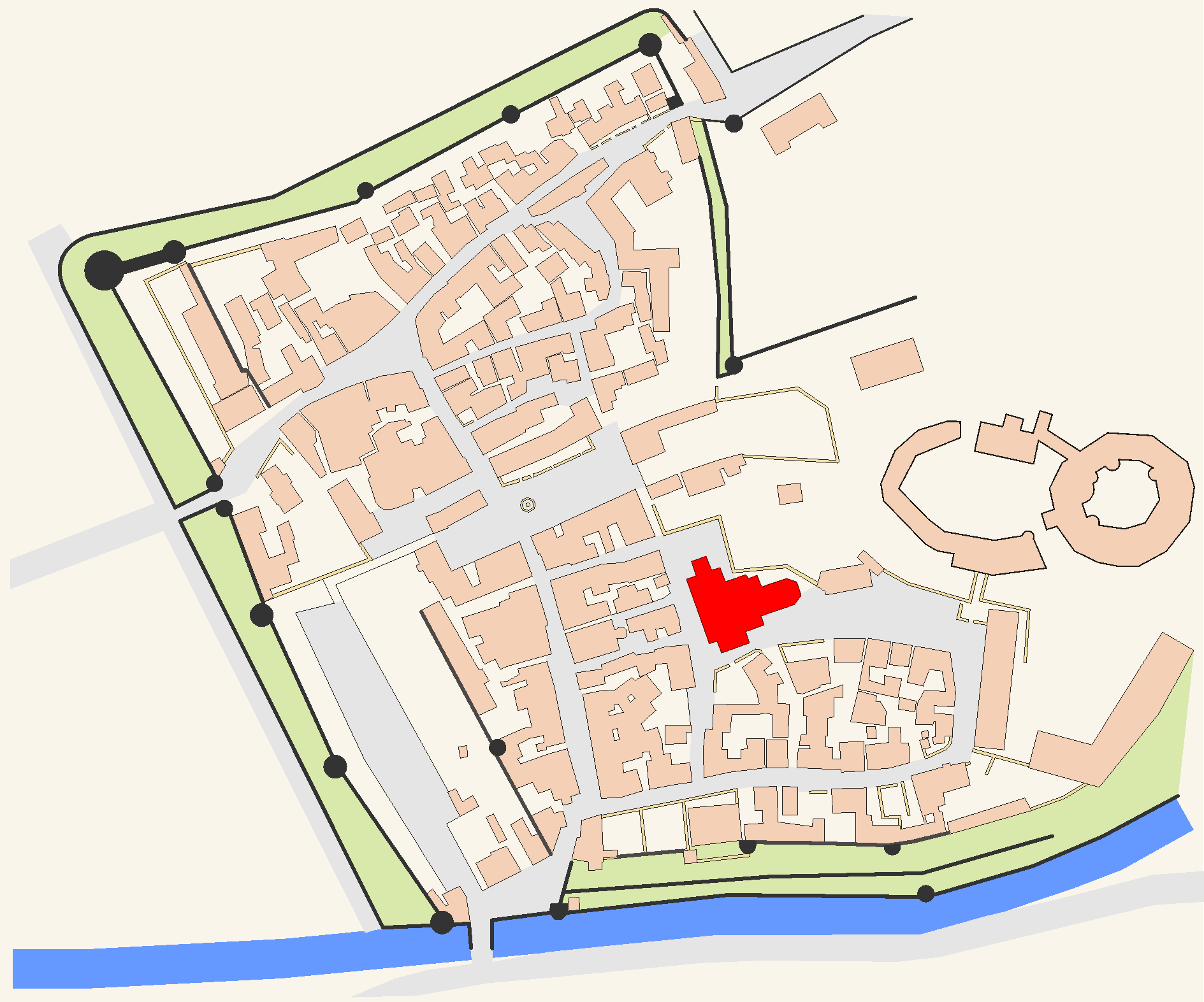 Stadtplan der Büdinger Altstadt - Hervorgehoben die Marienkirche